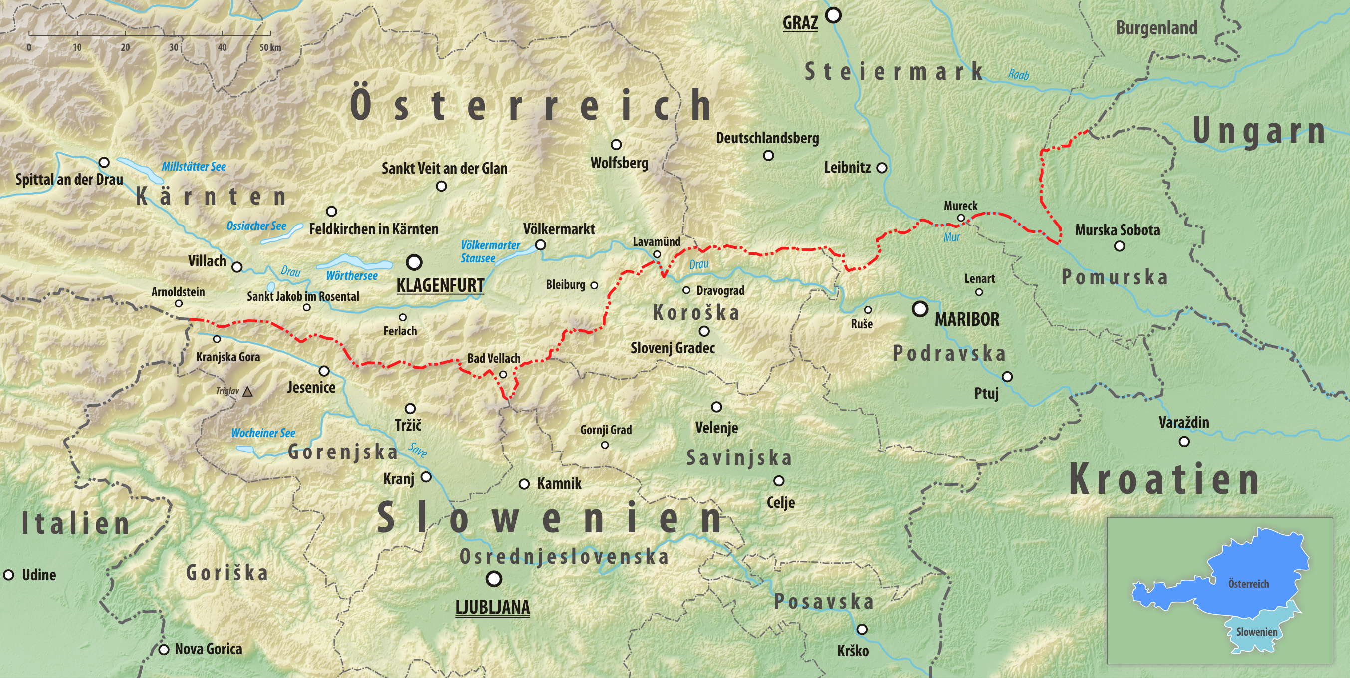 Reliefkarte des Grenzverlaufes zwischen Österreich und Slowenien Topographischer Hintergrund: NASA Shuttle Radar Topography Mission (public domain). SRTM3 v.2.